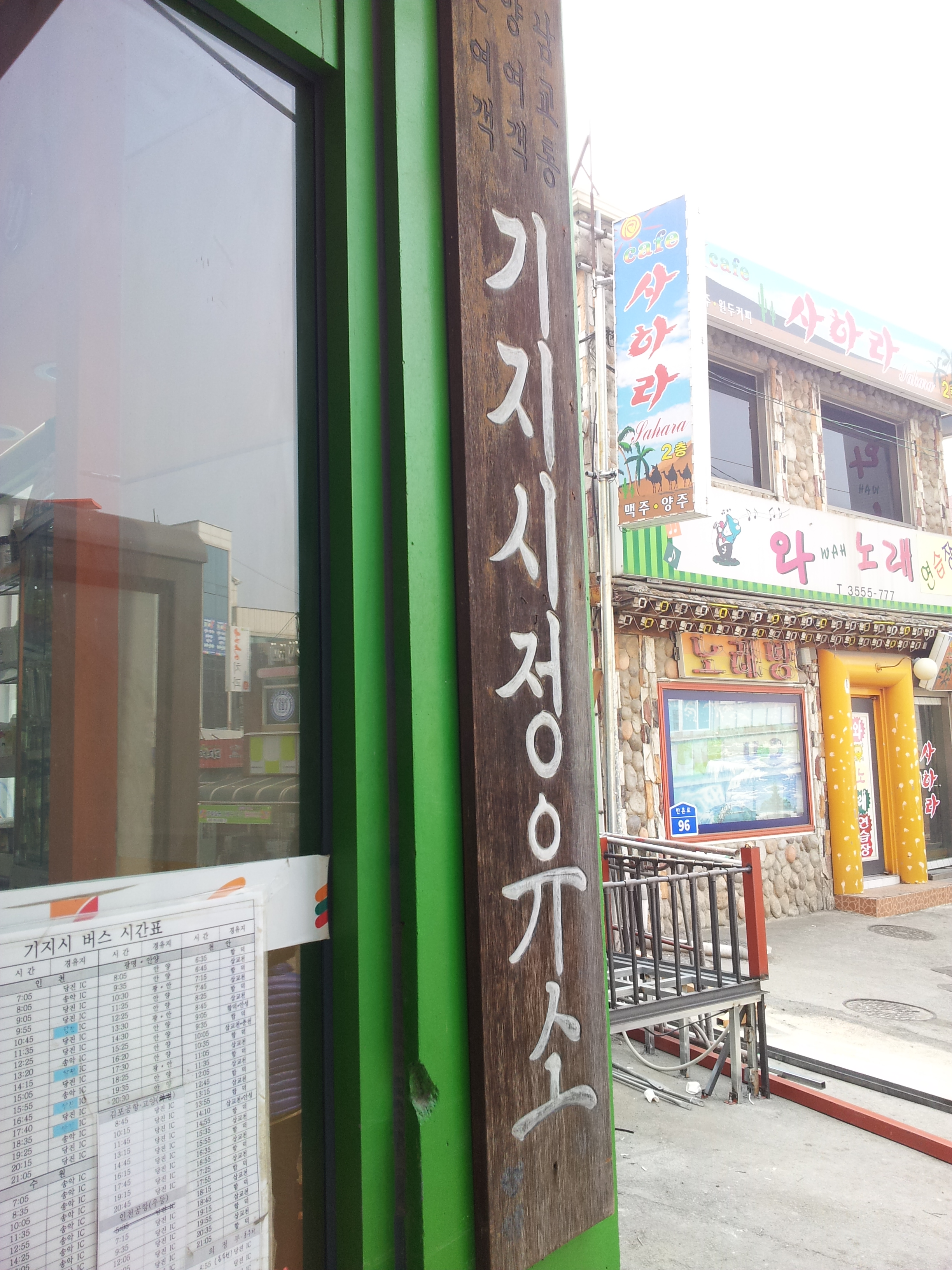 기지시시외버스정류장 간판